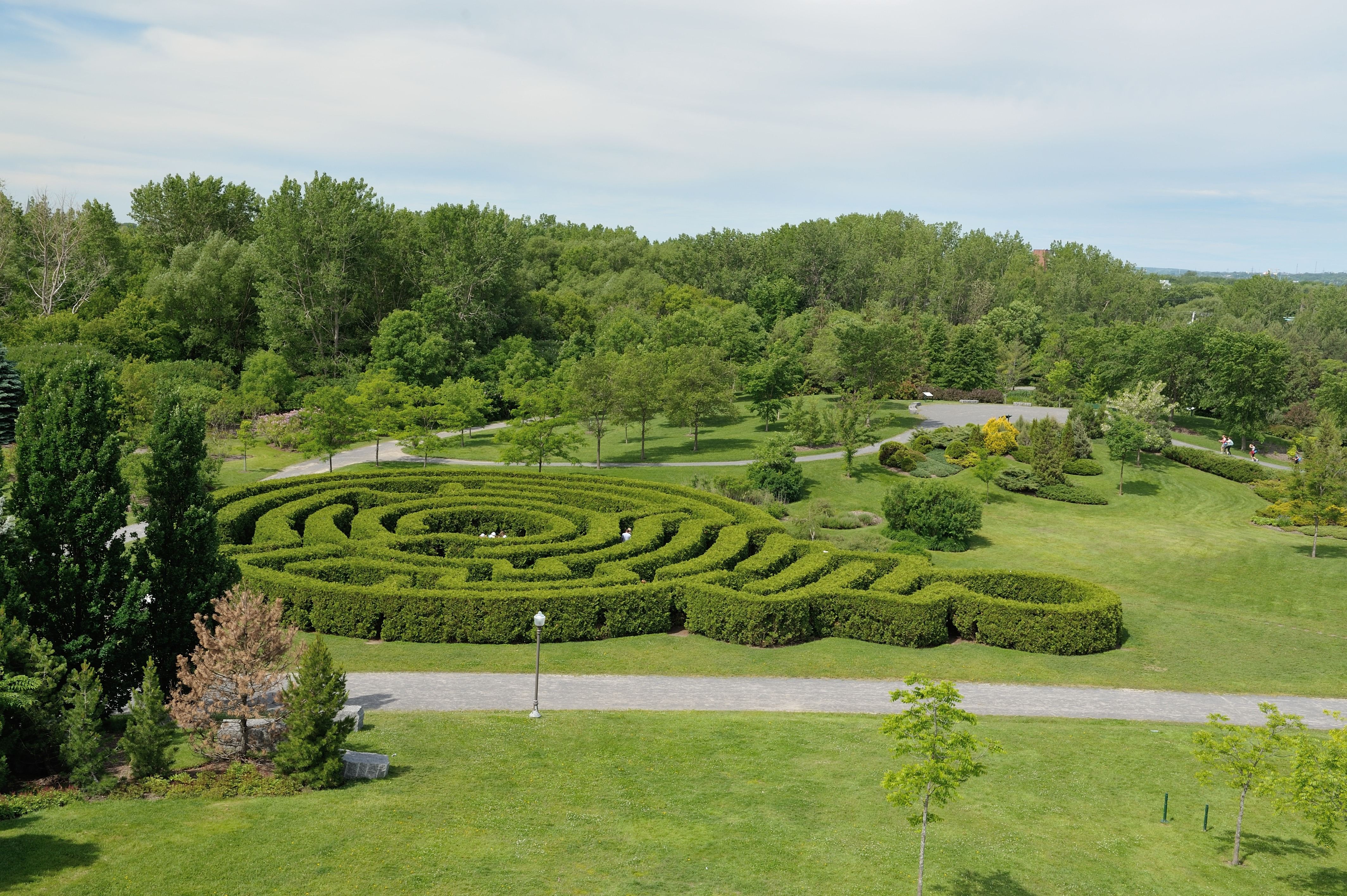 Surprenant labyrinthe de thuyas à l'arboretum du Domaine de Maizerets.